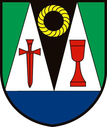 Rovečné, znak obce